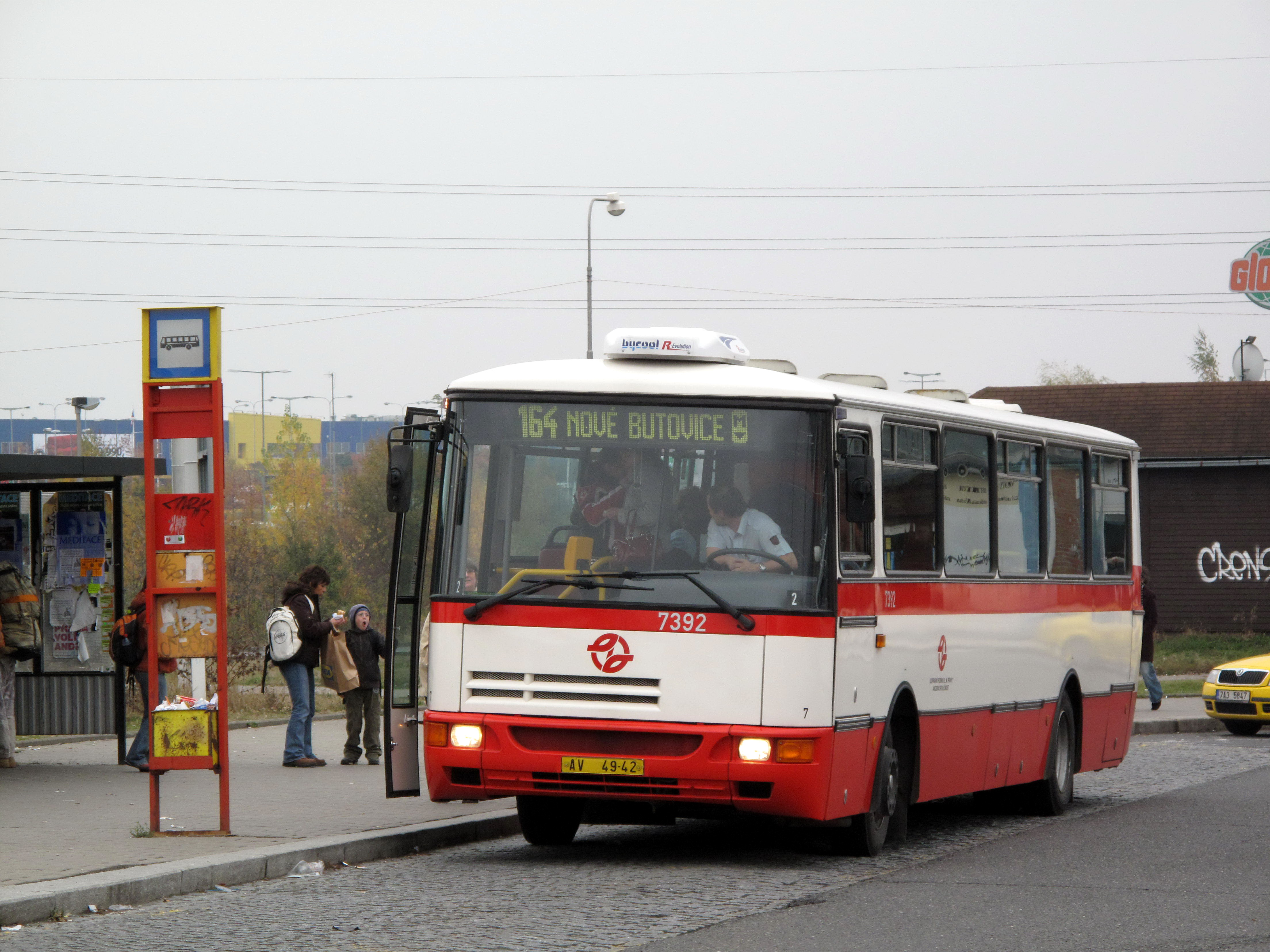 Autobus na Zličíně